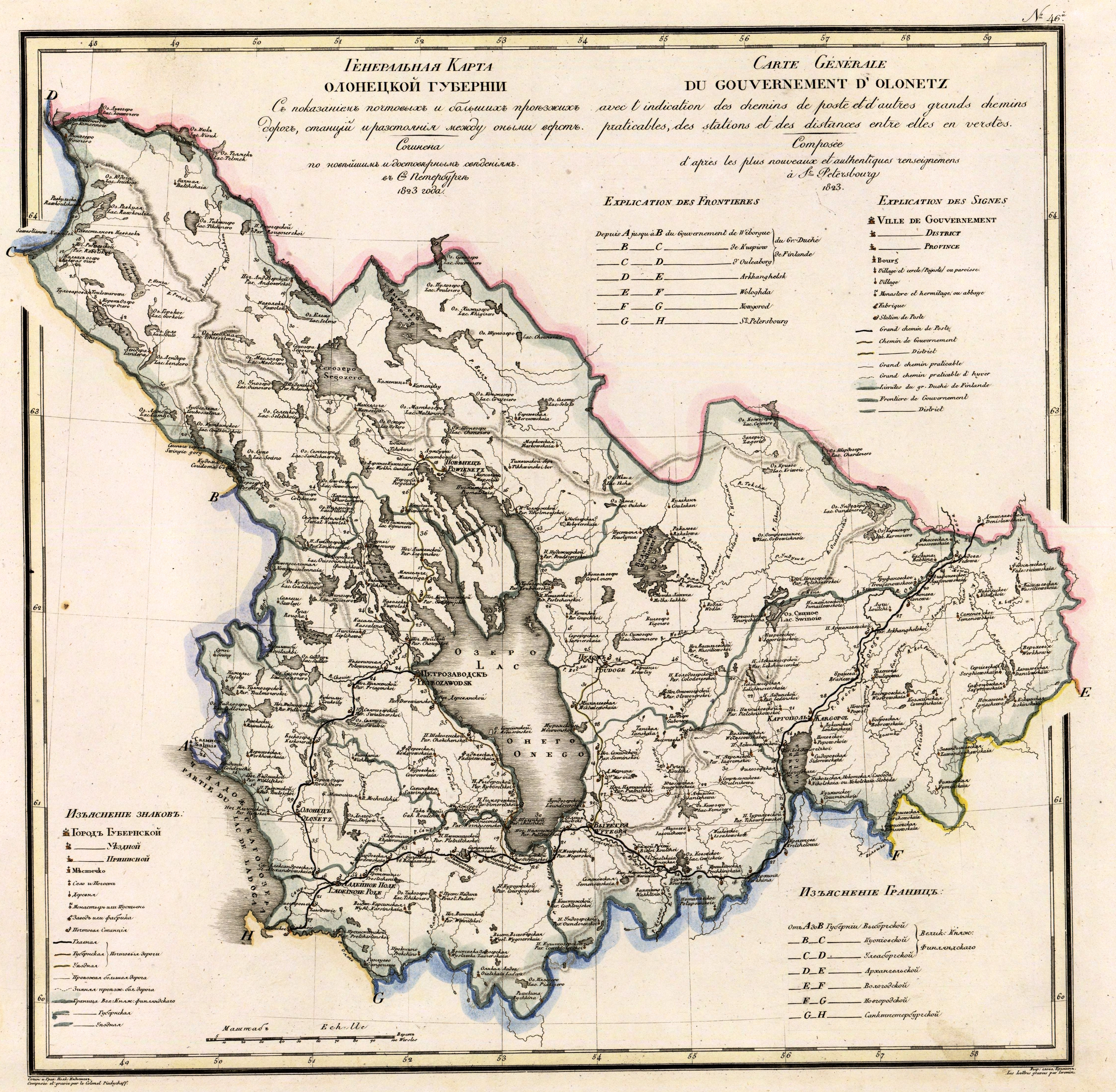 "Генеральная карта Олонецкой губернии с показанием почтовых и больших проезжих дорог, станций и расстояния между оными верст. Сочинена по новейшим и достоверным сведениям в С. Петербурге 1823 года." Входит в состав «Географического Атласа Российской Империи, царства Польского и Великого Княжества Финляндского», сочиненного служащим в Военно-топографическом Депо Свиты Его Императорского Величества по картографической части Подполковником Пядышевым, 1827 год.